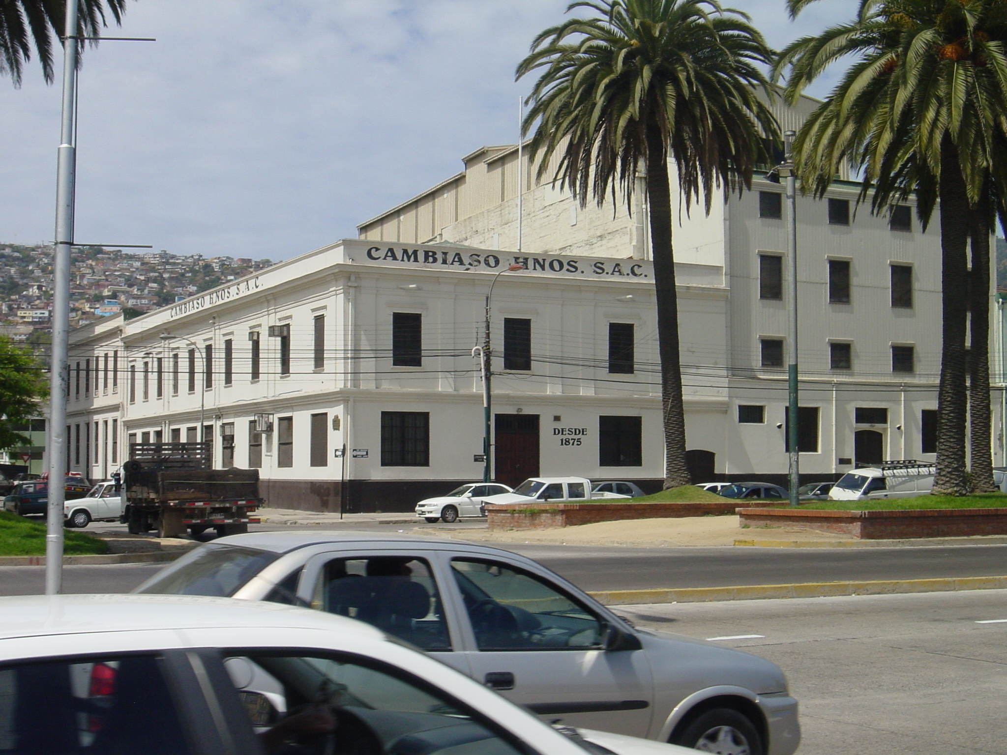 Cambiaso HNOS, Avenida Brasil, Valparaiso